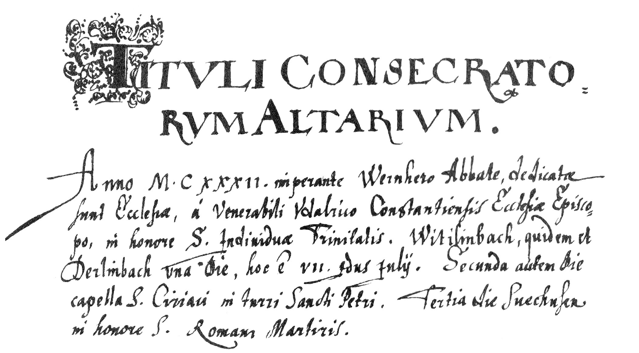 Kopialbuch des Klosters Ettenheimmünster (1584) mit der Weihenotiz der Kirche in Wittelbach von 1132